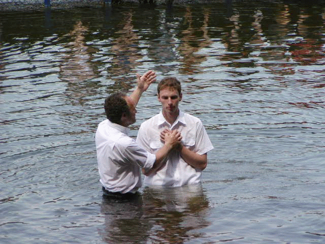 Chrzest w Gdańsku / Baptism in Gdansk, Poland